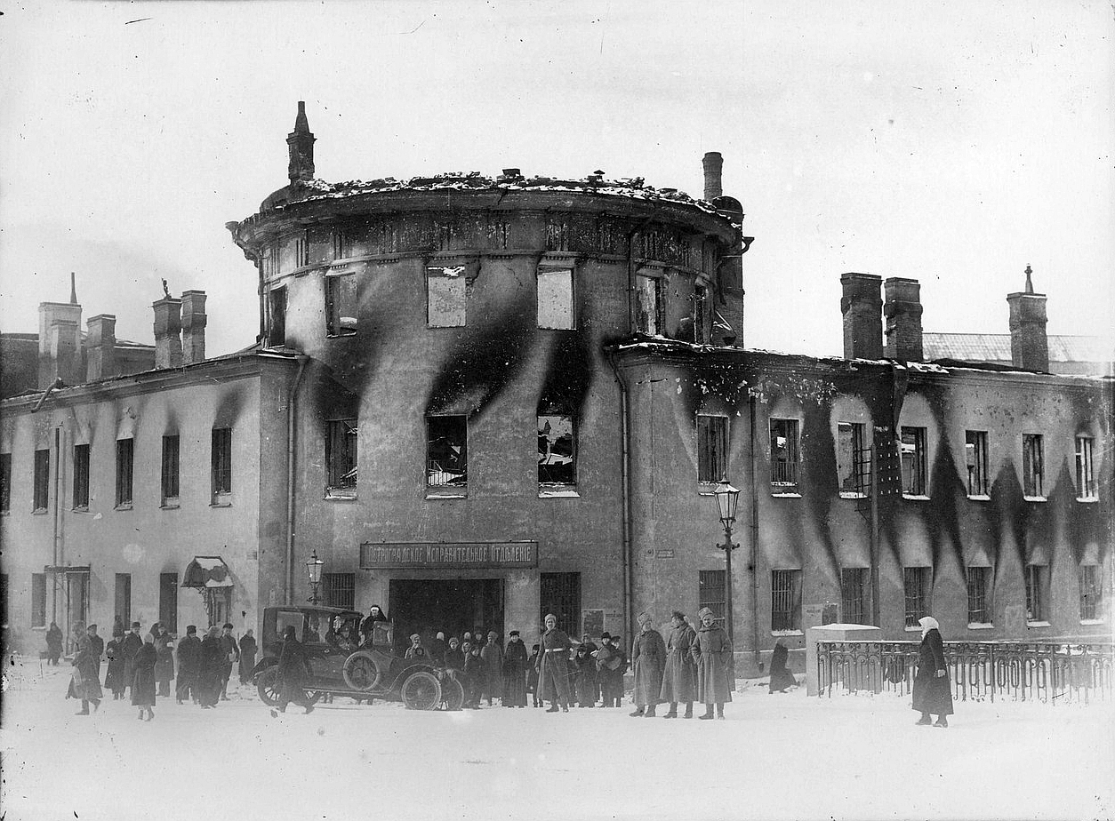 Перед сгоревшим Литовским замком со стороны Офицерского моста. После Февральской революции 1917 год. «Литовская тюрьма, сожженная революционерами» // Великая война в образах и картинах : [в 14 вып.] / под ред. Ив. Лазаревского. — М.: Издание Д. Я. Маковского, 1914-1917 (Товарищество типографии А. И. Мамонтова); [Вып. 12]. — 1916 — С. 235.